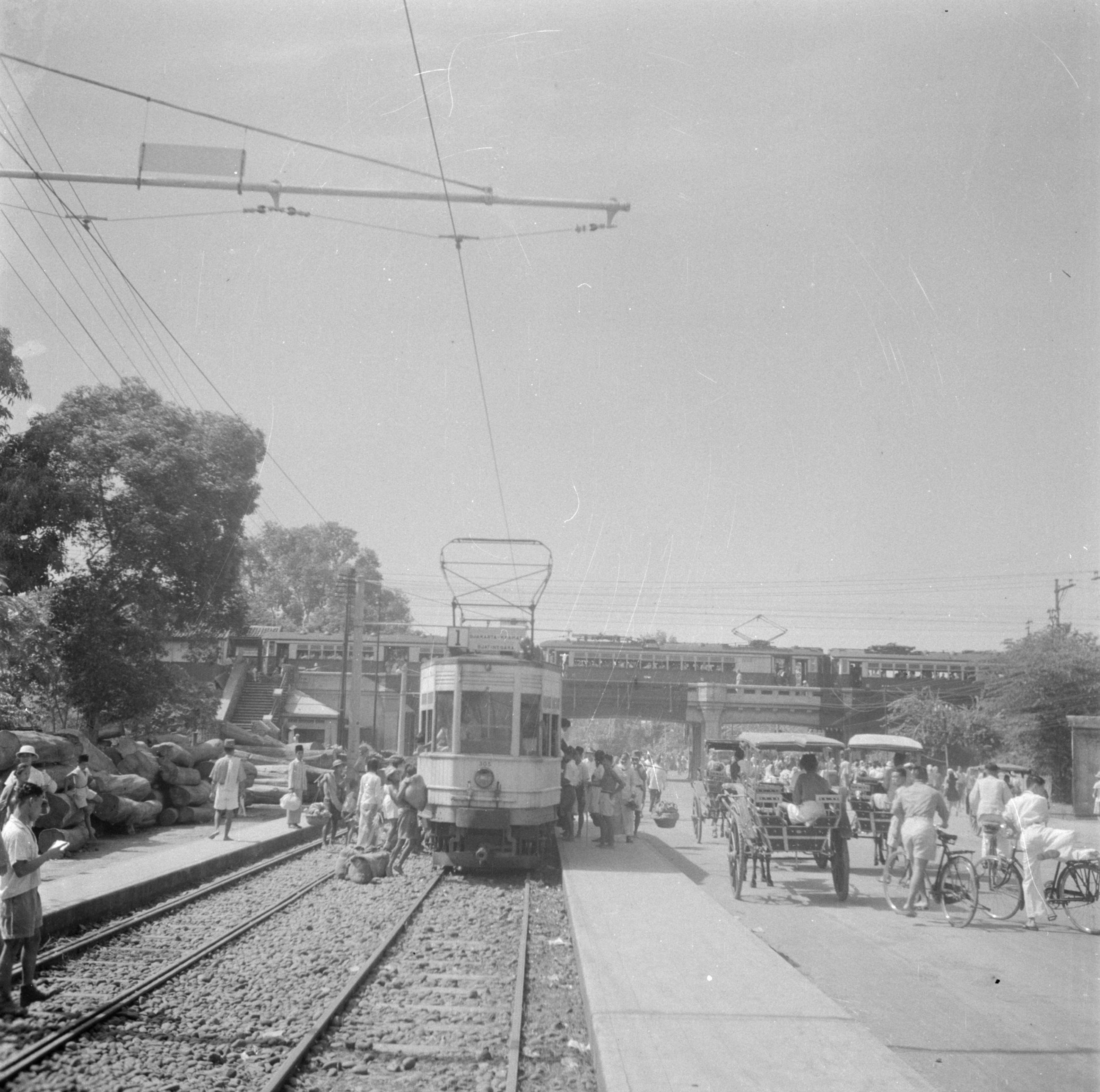 Collectie / Archief : Fotocollectie Van de Poll Reportage / Serie : Reis naar Indonesië Beschrijving : De electrische tram nr. 1 op de Mataramweg in Batavia, gezien richting Meester Cornelis. Op de achtergrond het spoorwegviaduct Datum : 1946 Locatie : Batavia, Indonesië, Jakarta, Nederlands-Indië Trefwoorden : straatbeelden, trams, vervoermiddelen Fotograaf : Poll, Willem van de, [onbekend] Auteursrechthebbende : Nationaal Archief Materiaalsoort : Negatief (zwart/wit) Nummer archiefinventaris : bekijk toegang 2.24.14.02 Bestanddeelnummer : 255-6738